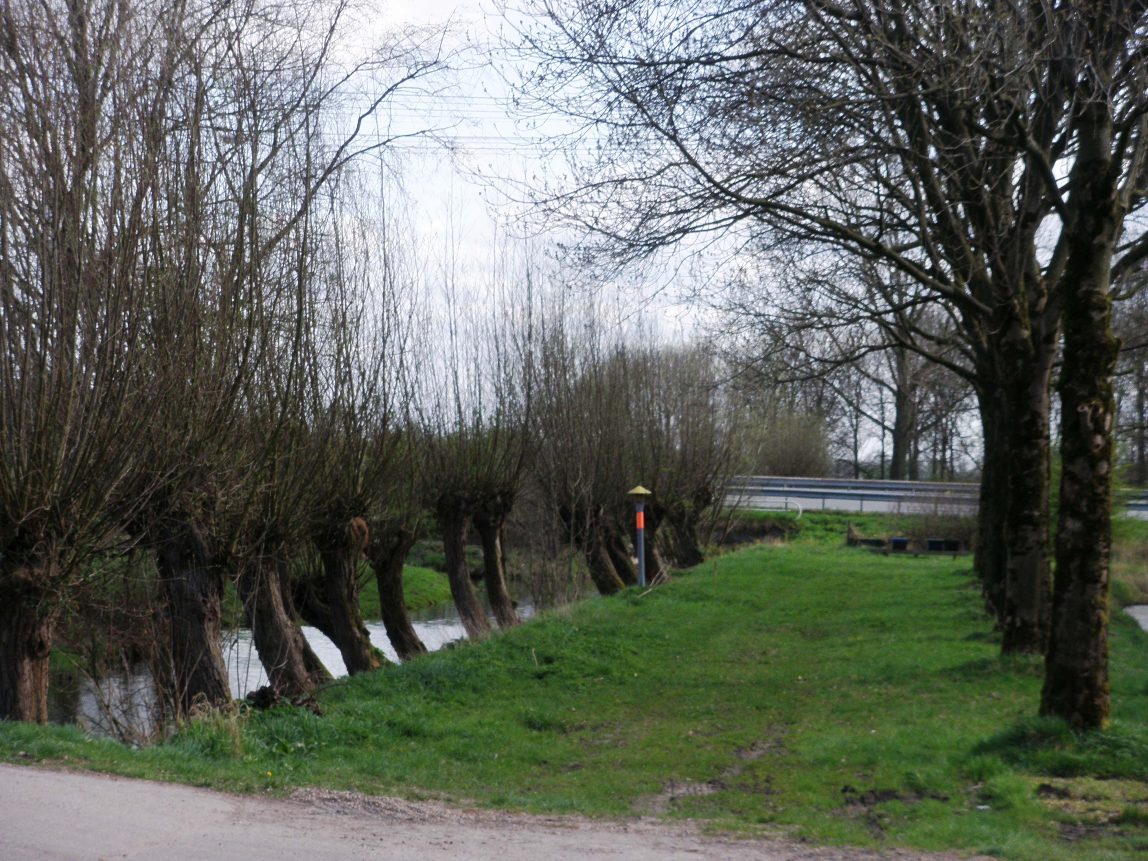 Voormalig traject van de Cattenbroekerdijk. Door de aanleg van de A12 werd naast de weg een verhoging aangelegd met viaduct over de autosnelweg.